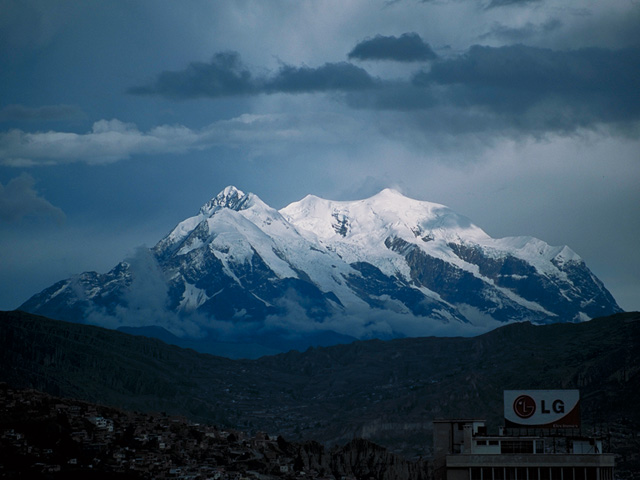 Mount Illimani from La Paz Boliva December 2001